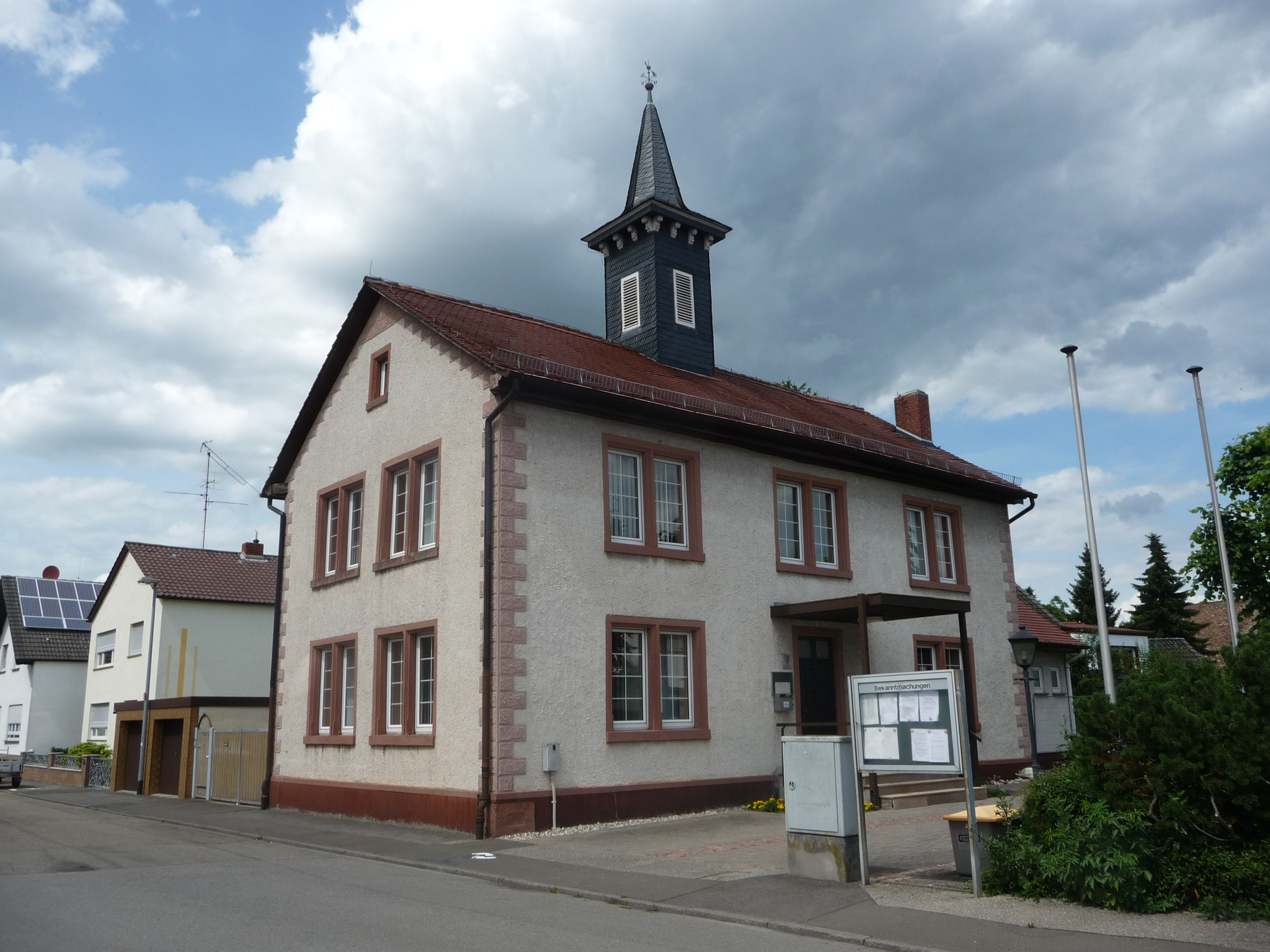 Bobstadt ist ein Stadtteil von Bürstadt im Kreis Bergstraße in Hessen.